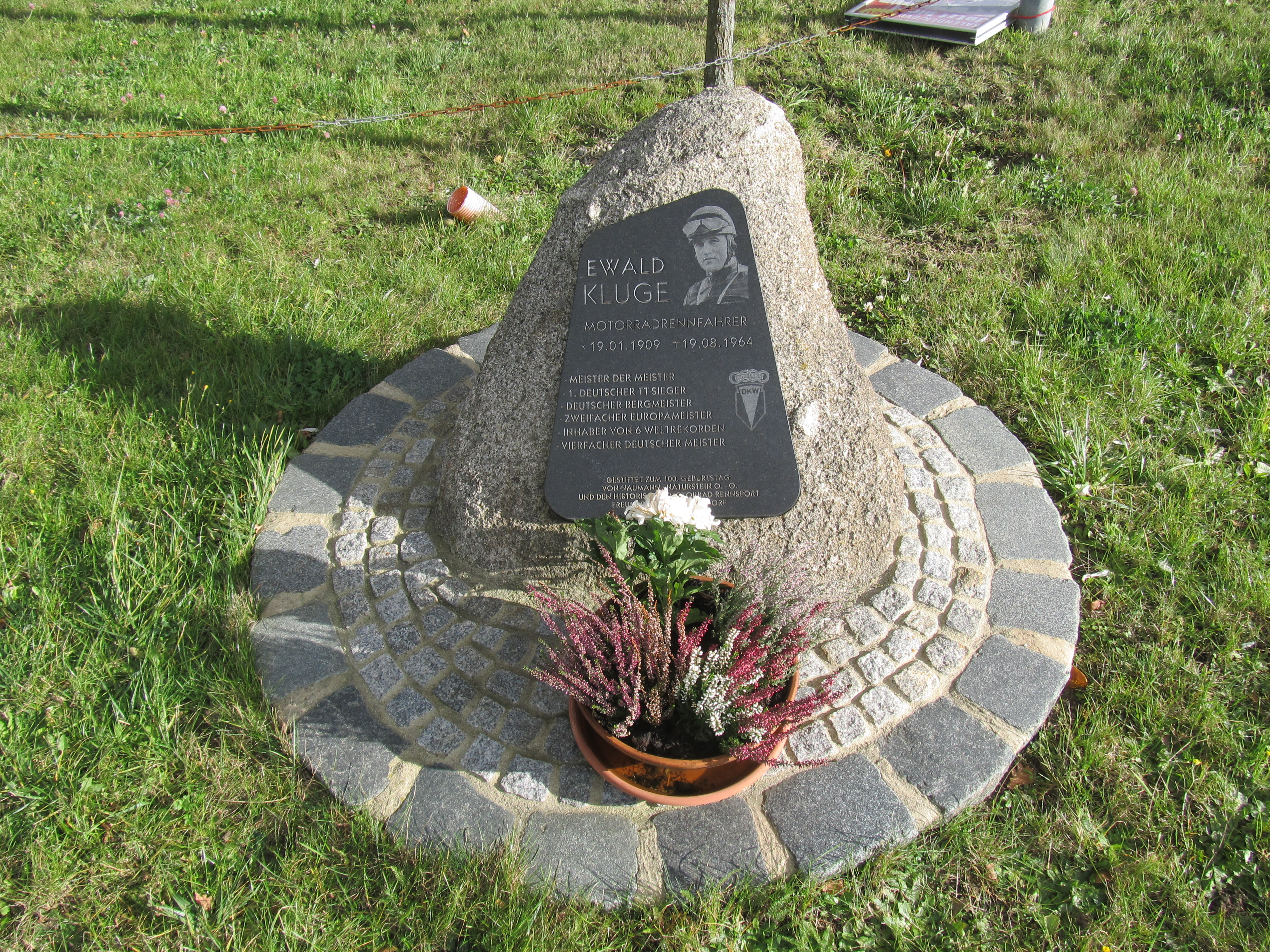 Gedenkstein an der Ewald-Kluge-Eiche